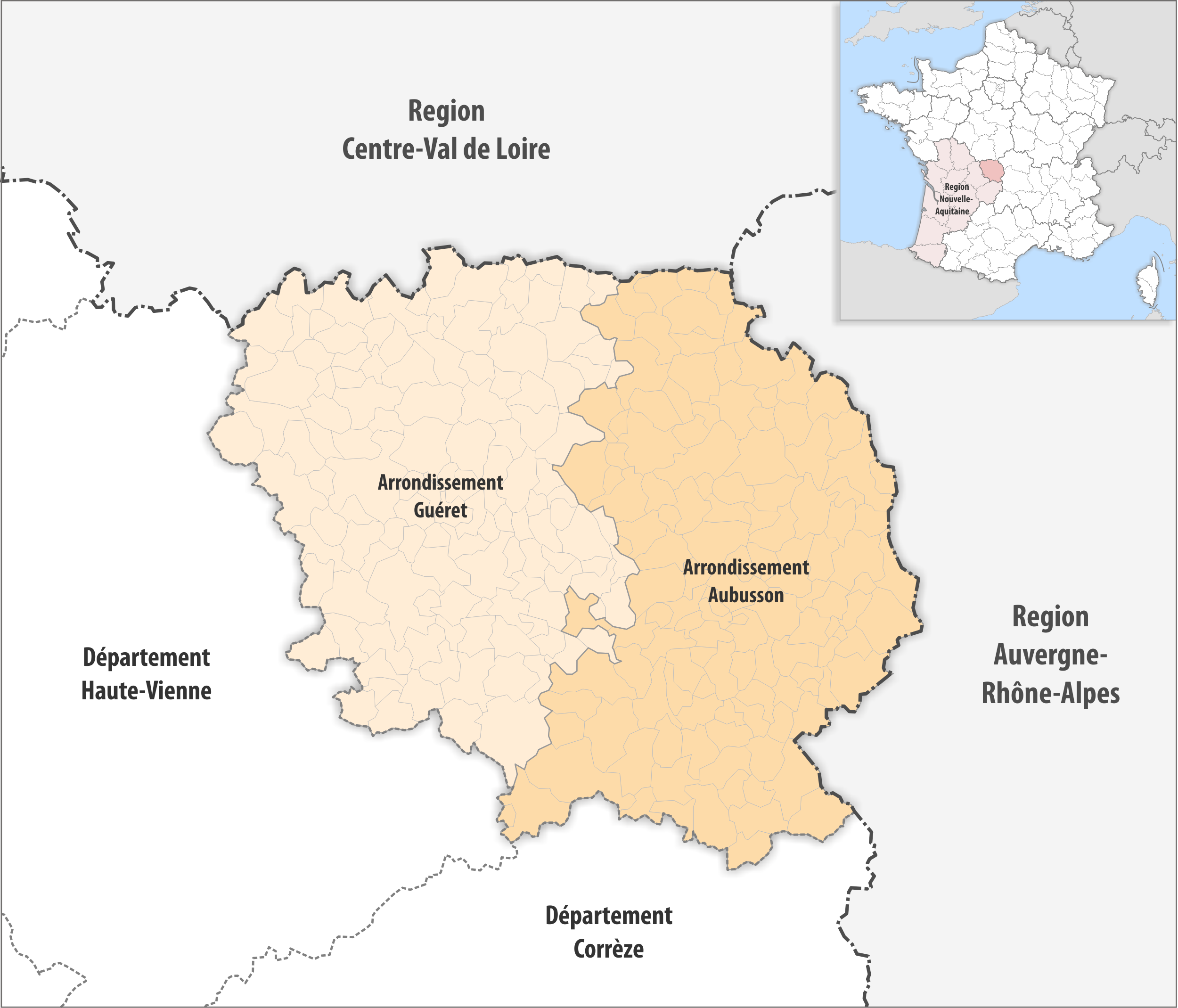 Gemeinden und Arrondissemente im Departement Creuse